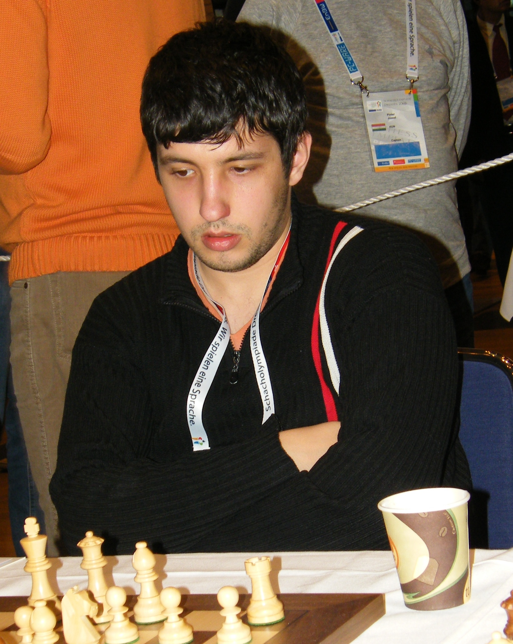 Constantin Lupulescu bei der 38. Schacholympiade in Dresden 2008